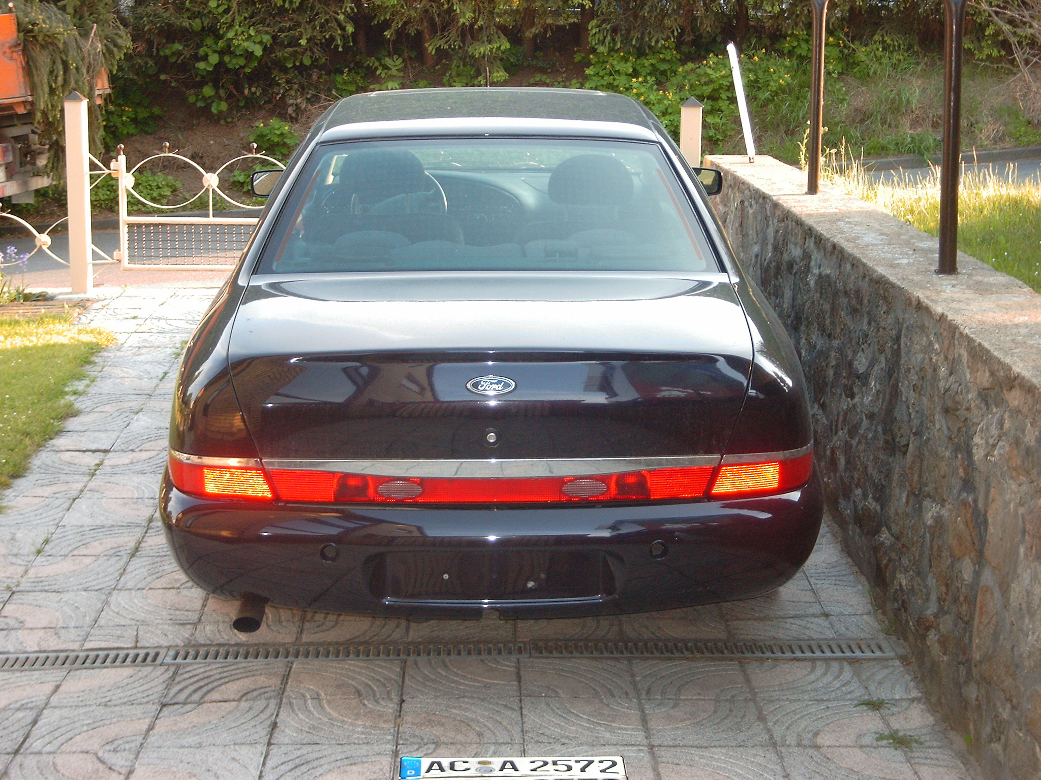 Ford Scorpio Ghia, Baujahr 1996